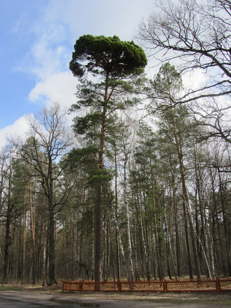 Хвоя Каралева